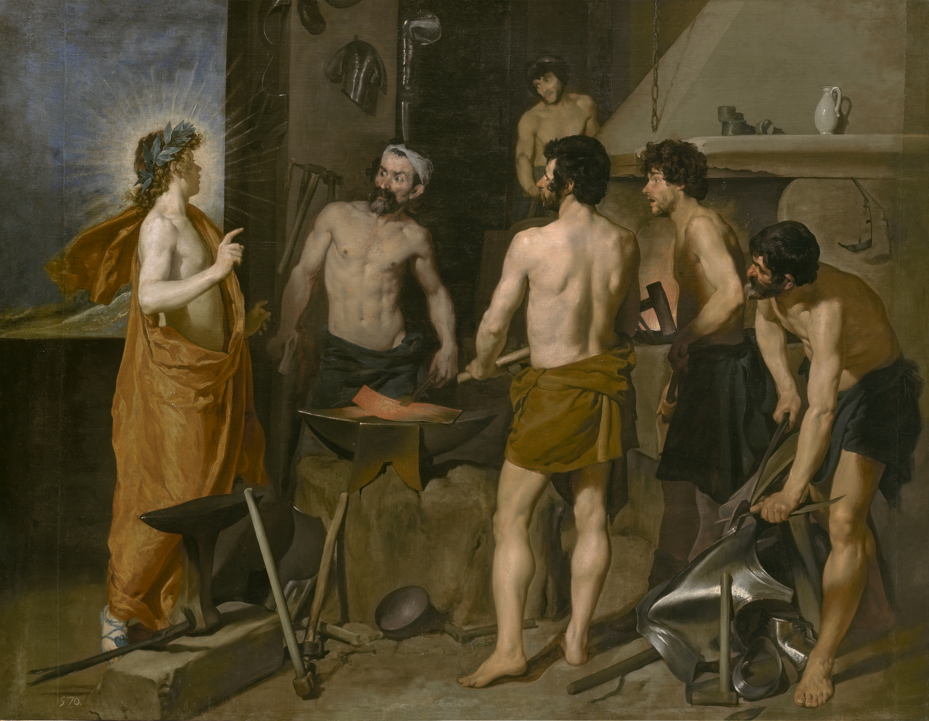 La obra representa al dios Vulcano en su fragua y recibiendo la visita del dios Apolo, que fue a comunicarle que Venus, la esposa de Vulcano, tenía una relación amorosa con Marte.